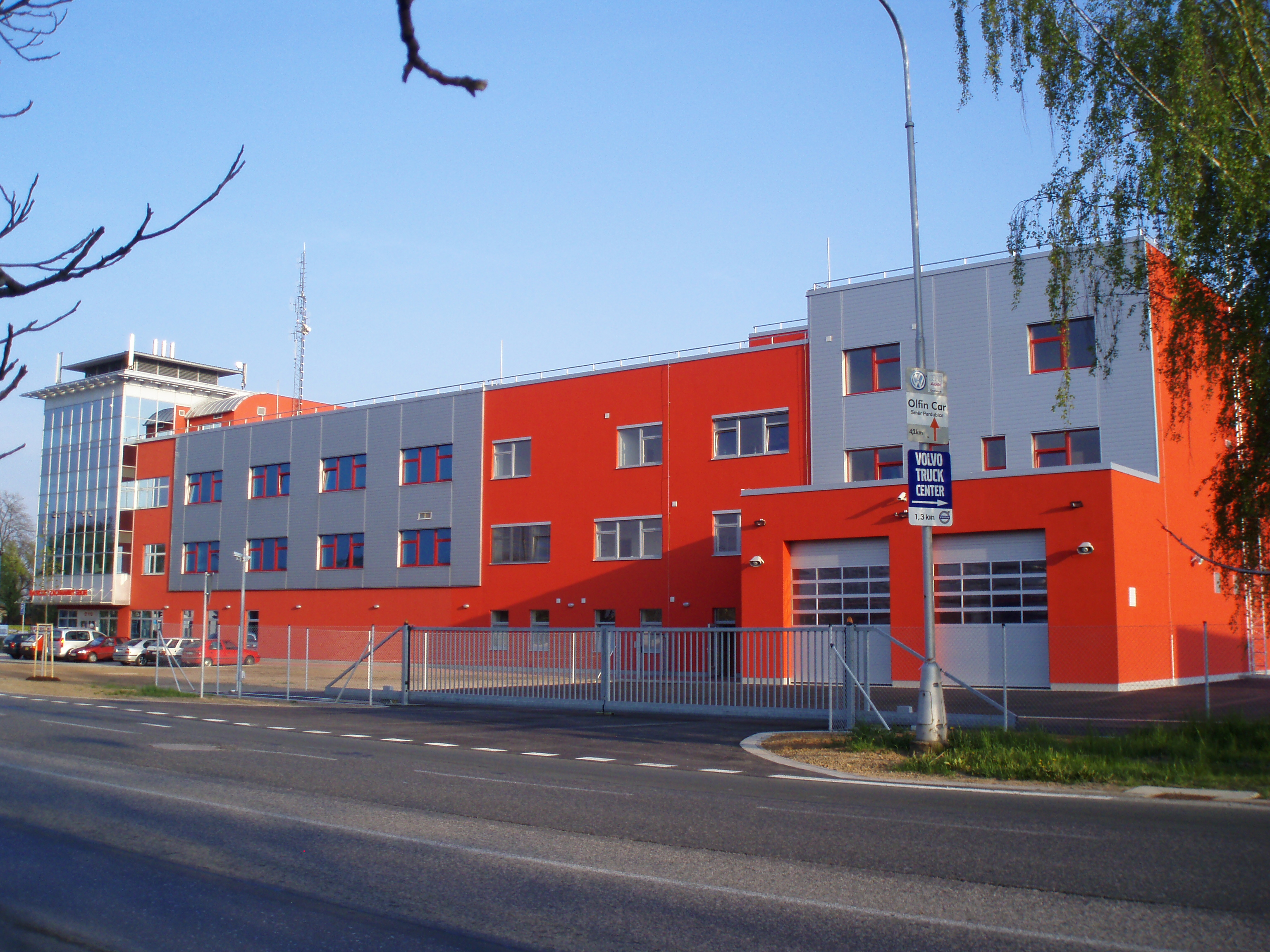 Centrální požární stanice HZS Královéhradeckého kraje, Pražská třída 230/153z, Hradec Králové-Plačice.